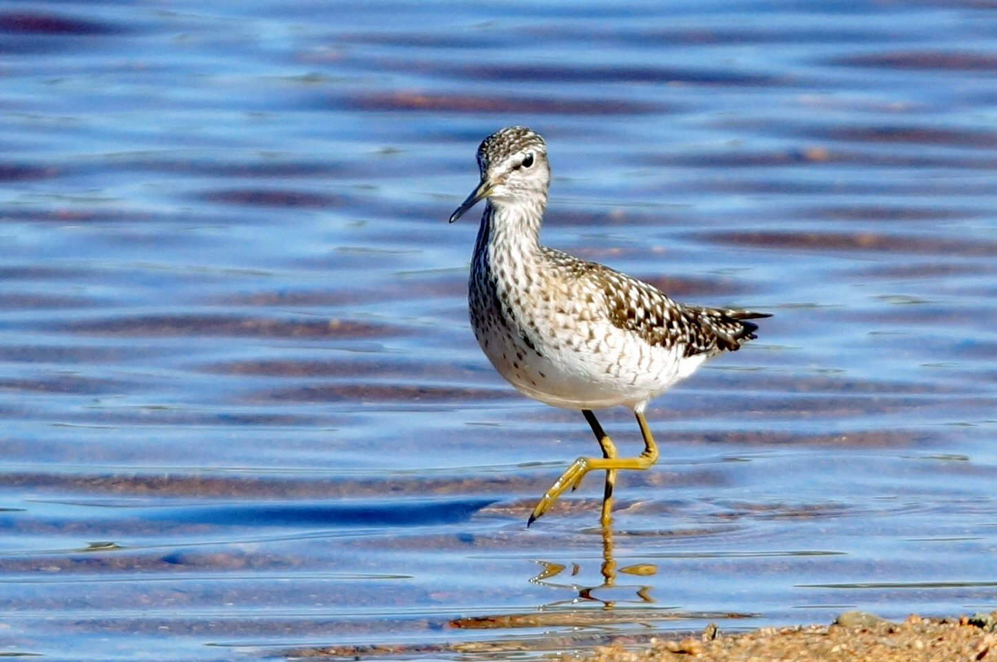 Liro. Kolari Äkäslompolon uimaranta